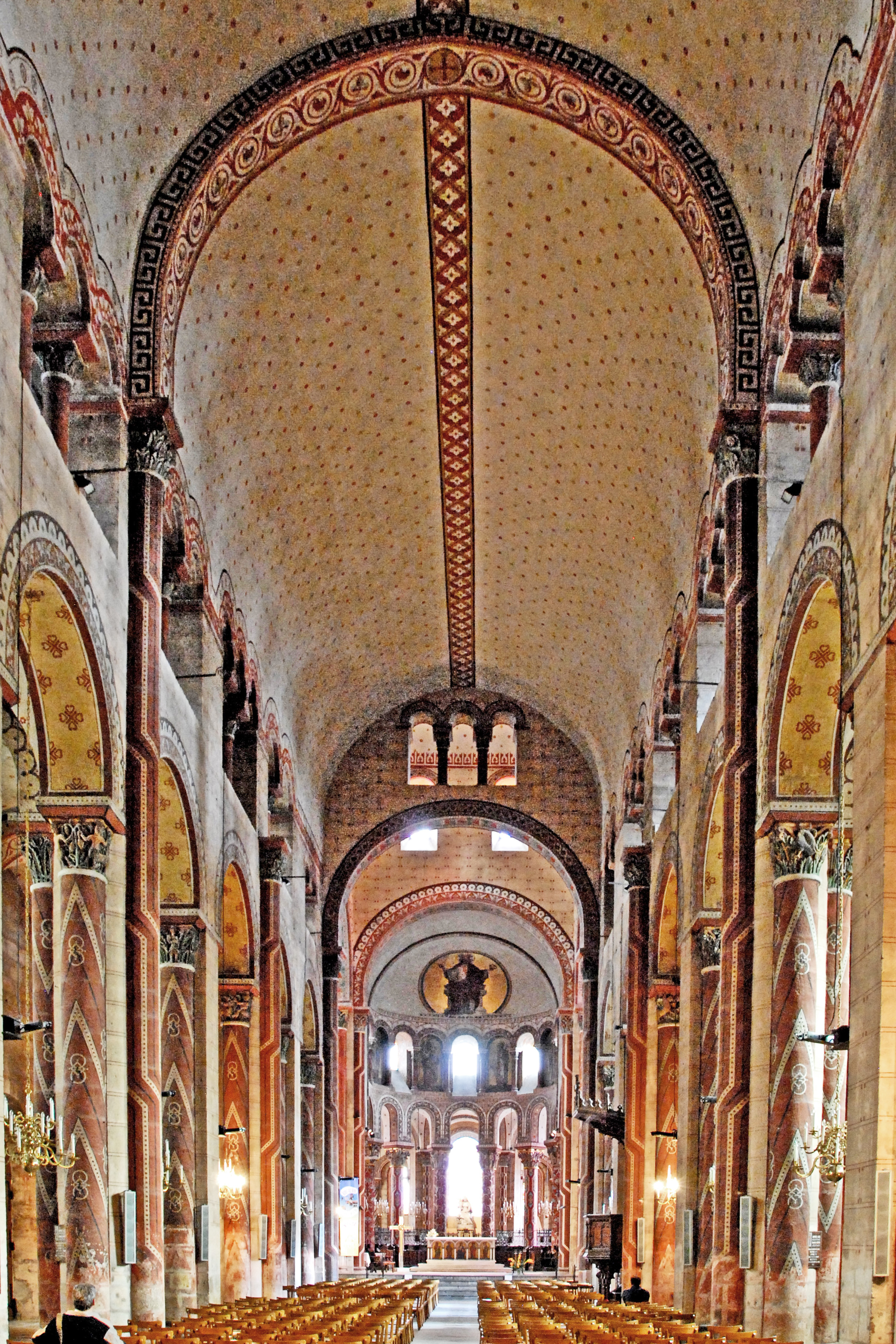 Mittelschiff ab Joch 3, zum Chor